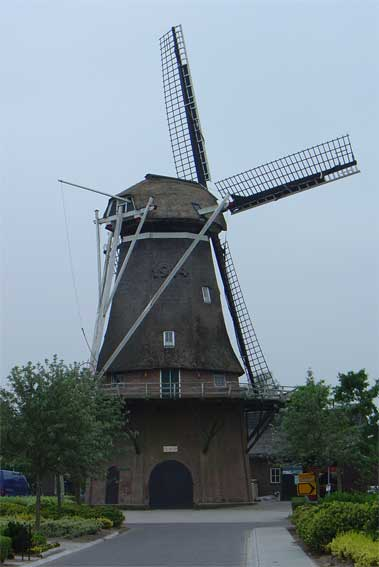 de molen de Hoop te Sleen (Drenthe) - bouwjaar 1914